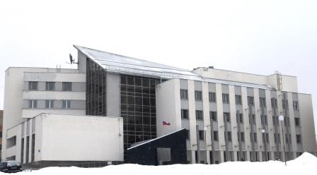 Здание налоговой службы в Петрозаводске на ул. Московской